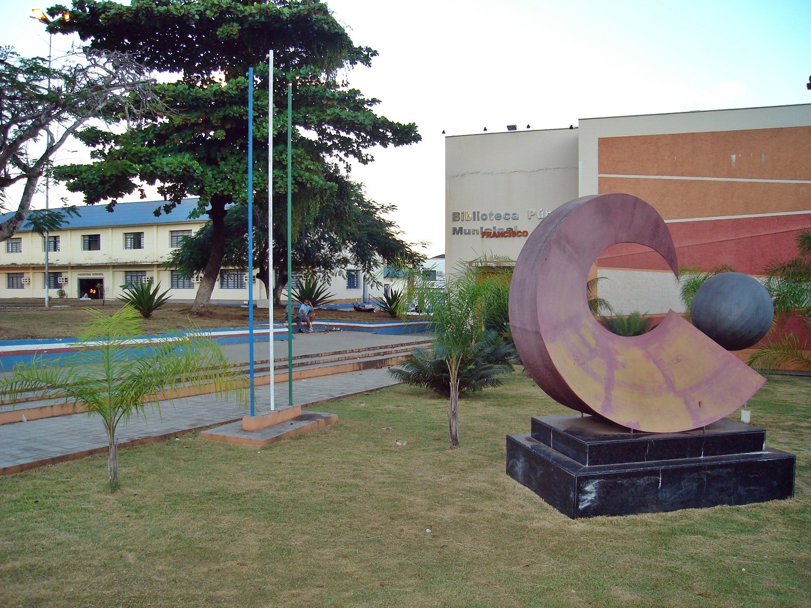 Prefeitura e Biblioteca Municipal de Porto Velho, Rondônia, Brasil - Town Hall and Library, Porto Velho, Brazil.